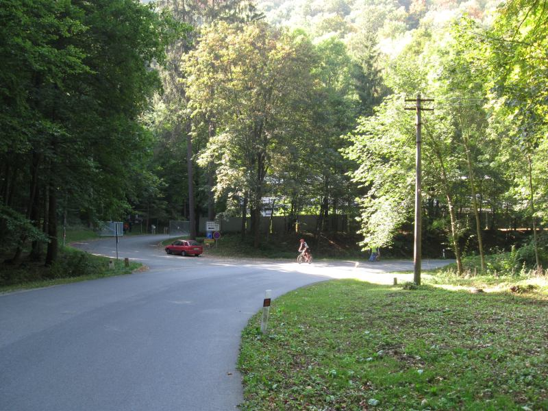 Křtinské údolí, jeskyně Výpustek